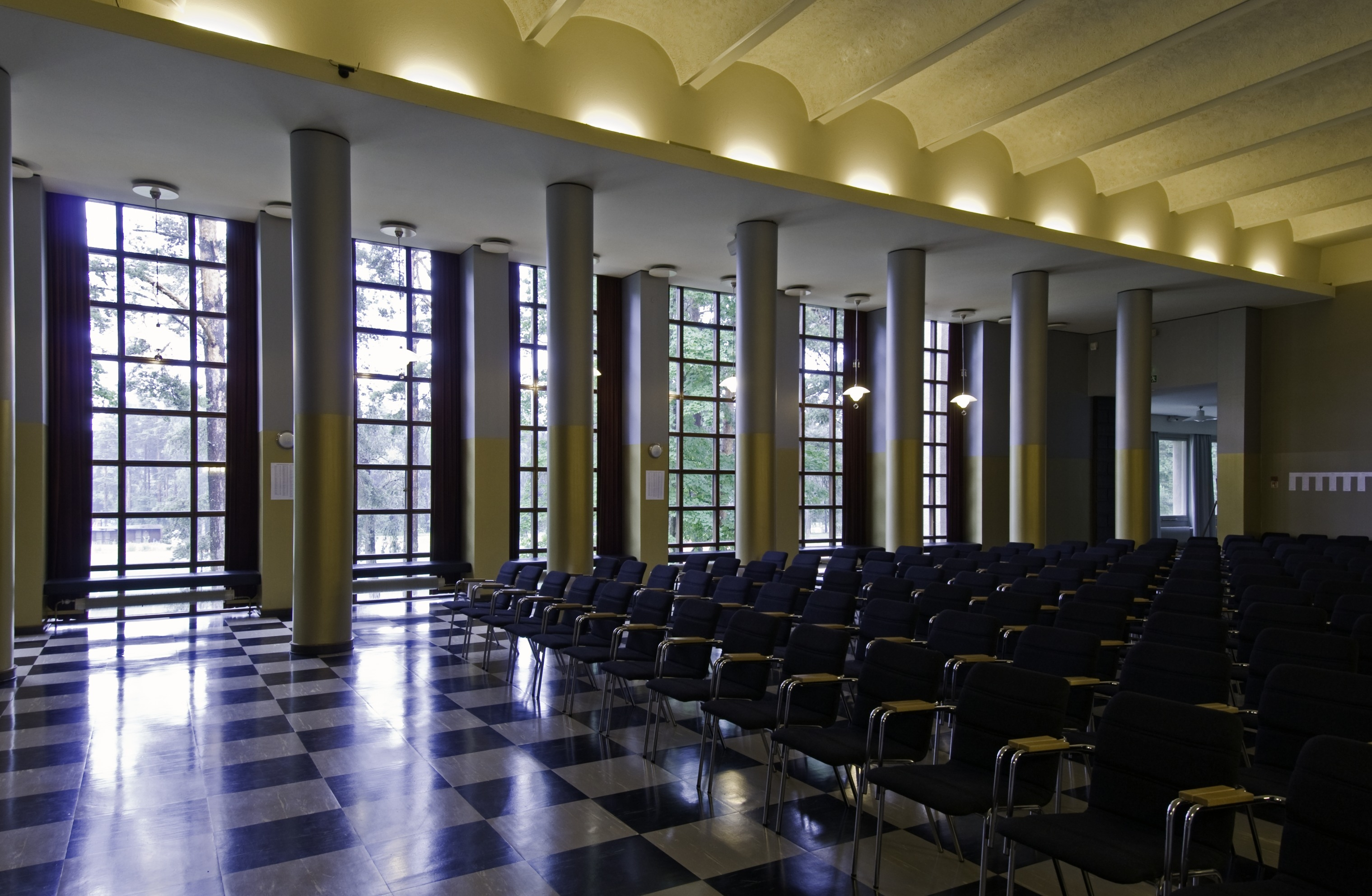 Maanpuolustuskorkeakoulu, Santahamina. Ruokasalirakennus, juhlasali. Arkkitehti Olavi Sortta 1939, valmistunut 1940.